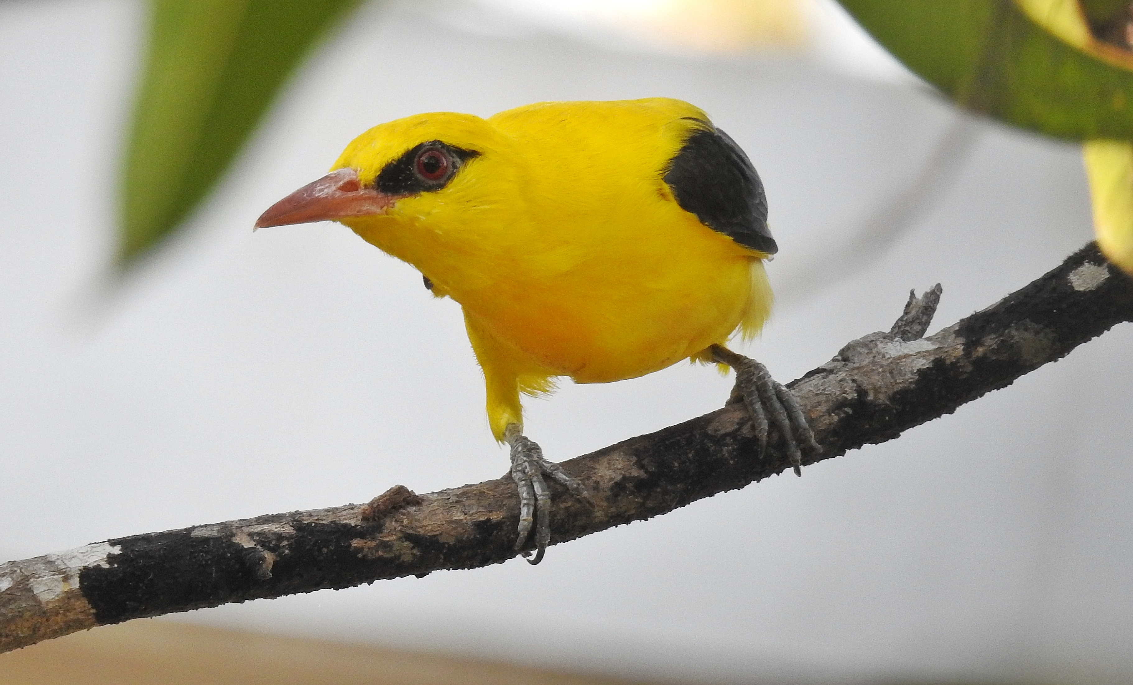 From kannur kerala